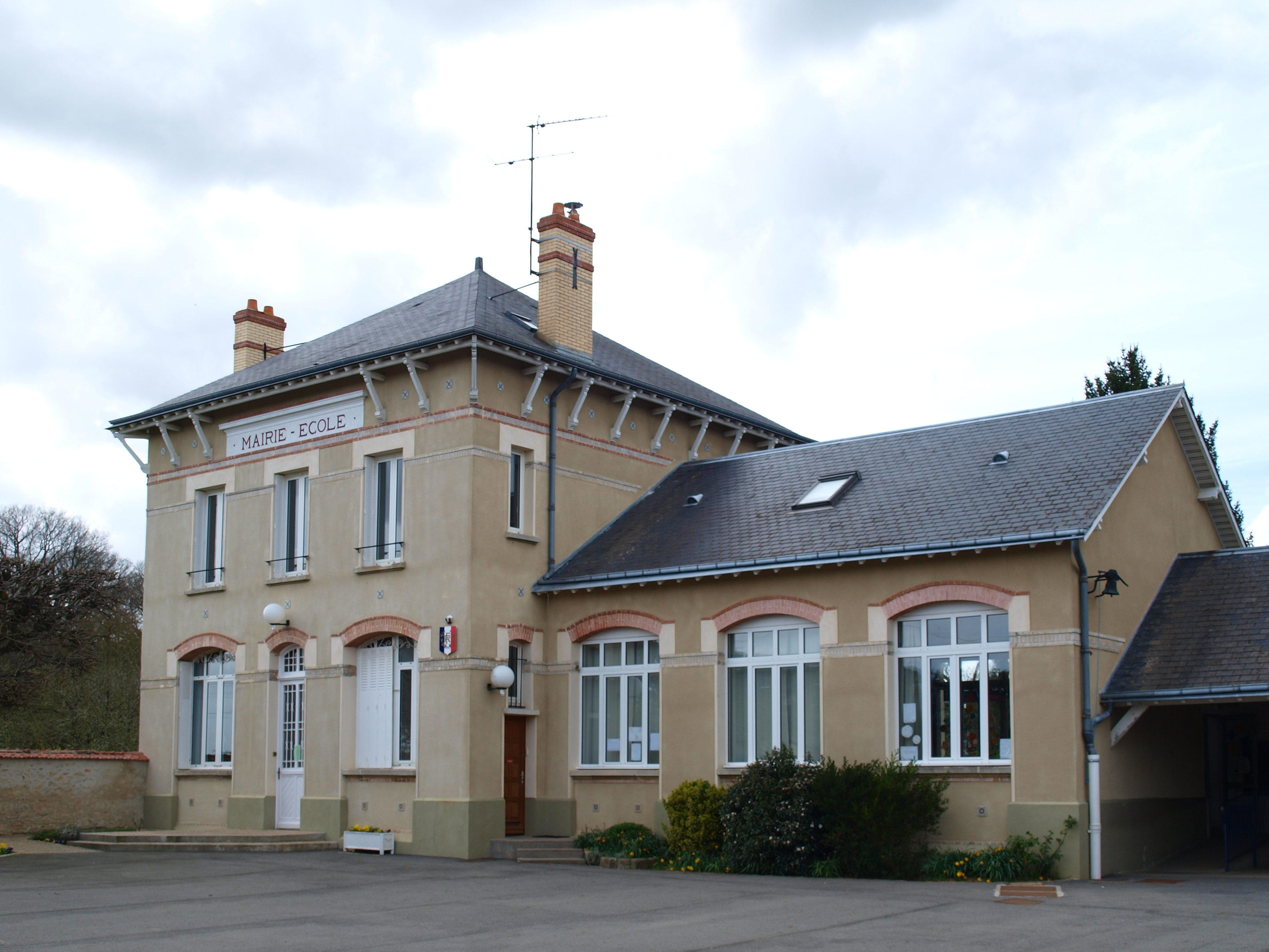 Plessis-Saint-Benoist (Essonne, France) ; mairie